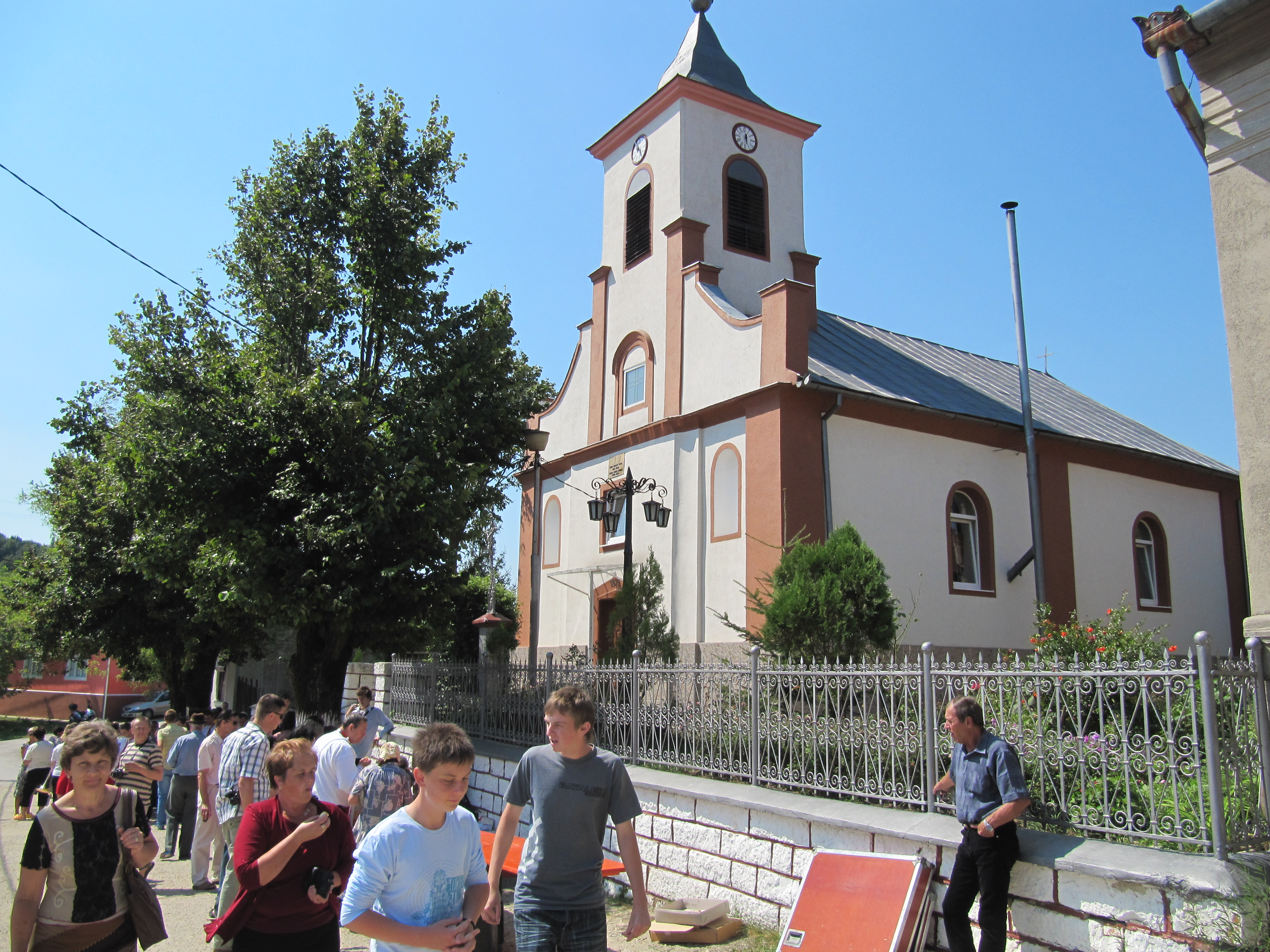 Svatá Helena, Banát, Rumunsko.